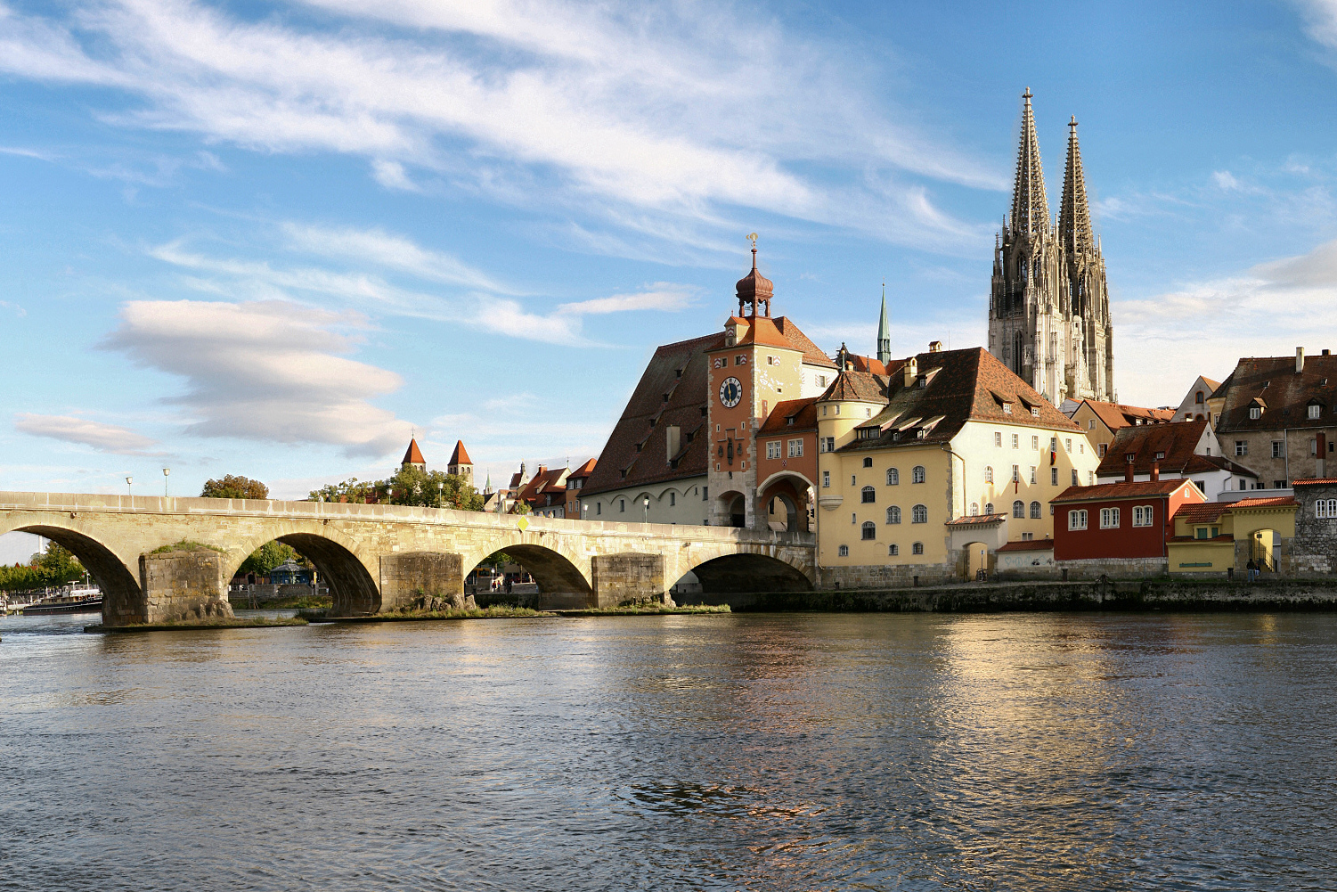 Beschreibung: Regensburg Uferpanorama Quelle: selbst fotografiert Datum: August 2006 Fotograf: Karsten Dörre (grizurgbg)